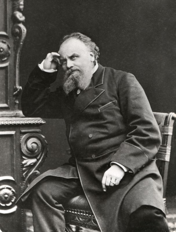 Portrait d'Aristide Boucicaut (1810-1877), fondateur du grand magasin parisien Au Bon Marché.